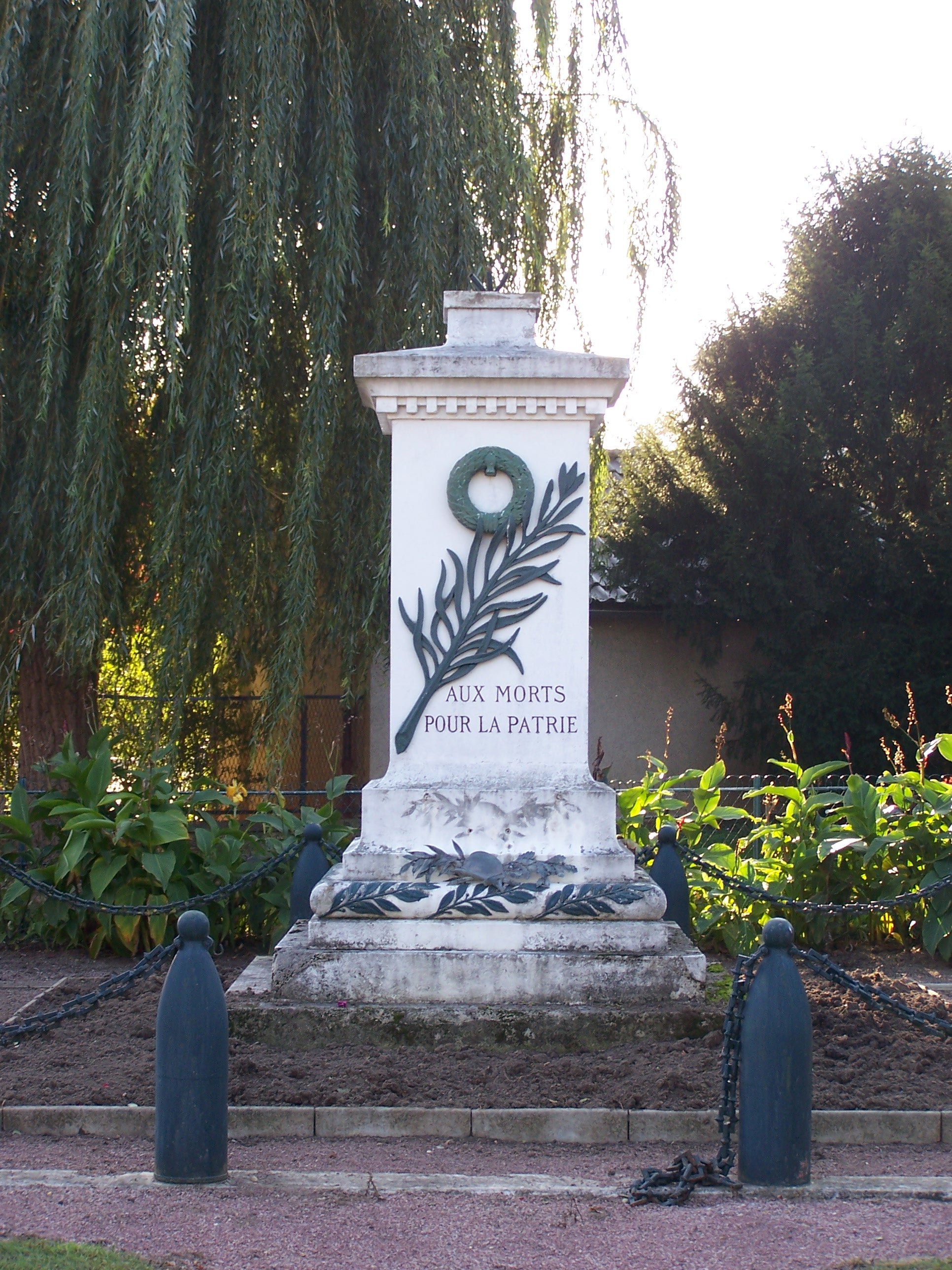 Monument aux morts de Neauphle-le-Château (Yvelines, France)